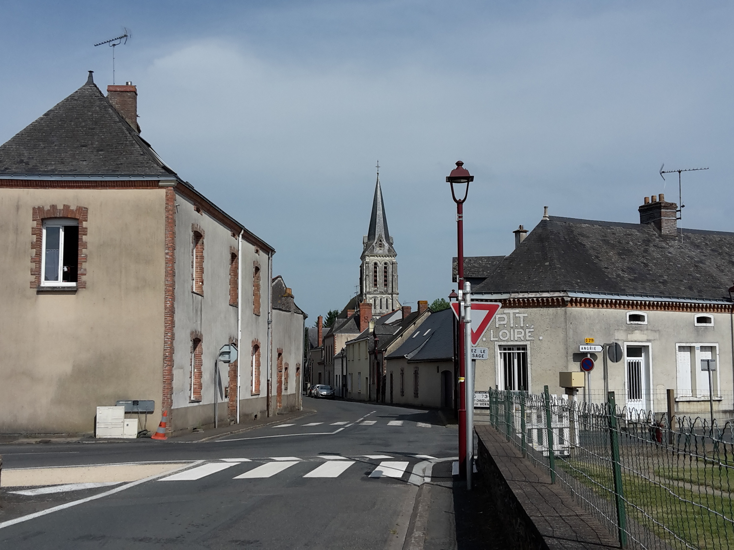 Loiré, Maine-et-Loire, France.